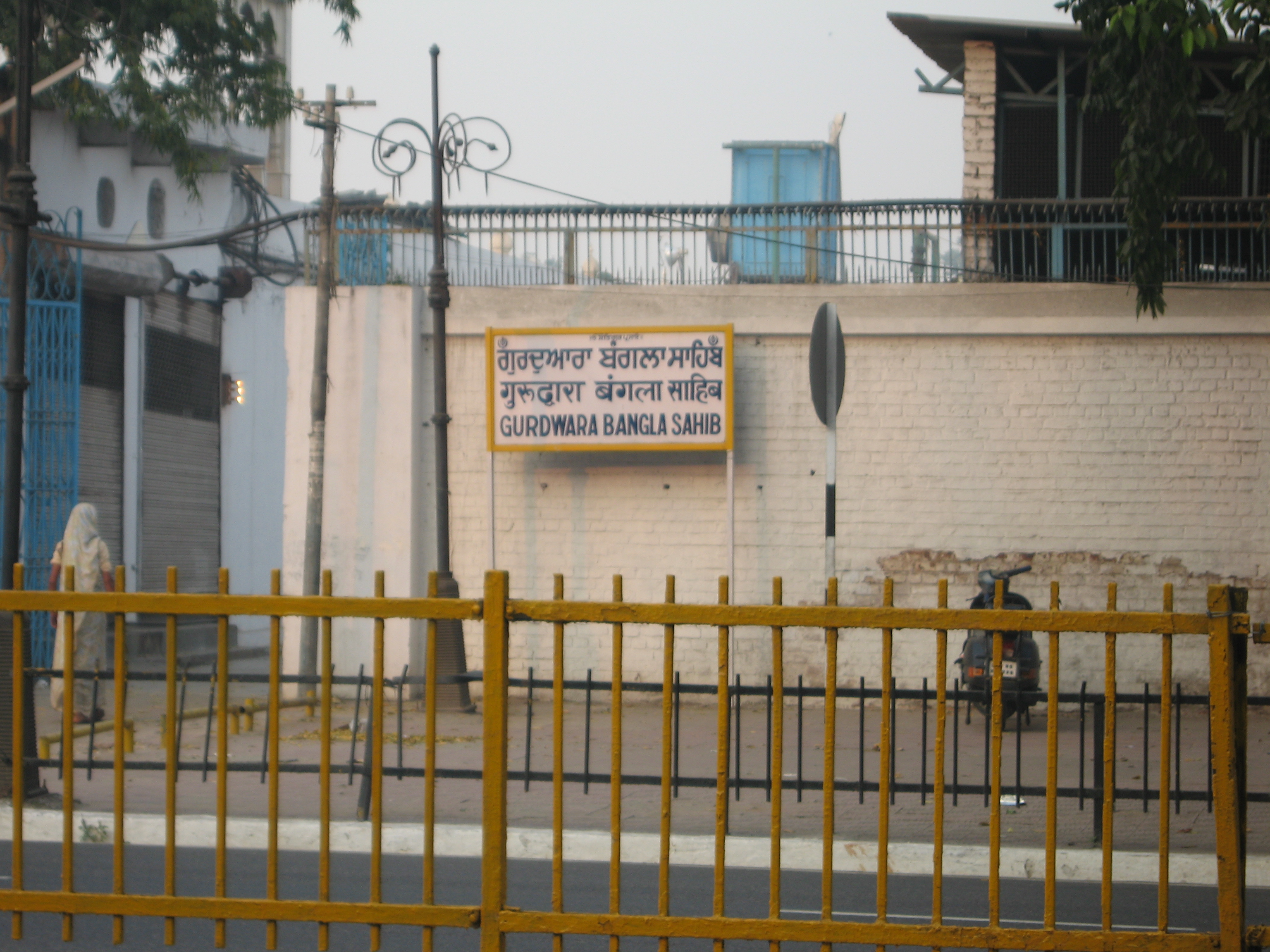 Gurudwara Bangla Sahib, New Delhi